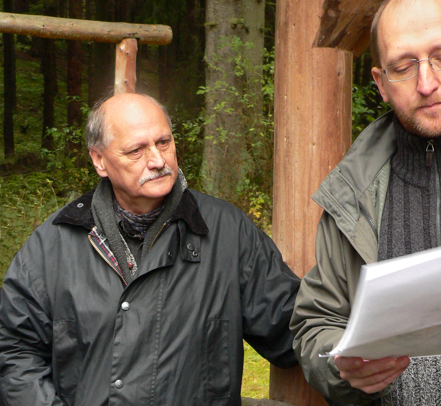 An der überdachten Teilrekonstruktion der Waldglashütte am Lakenborn, links Hans-Georg Stephan, rechts Radoslav Myszka